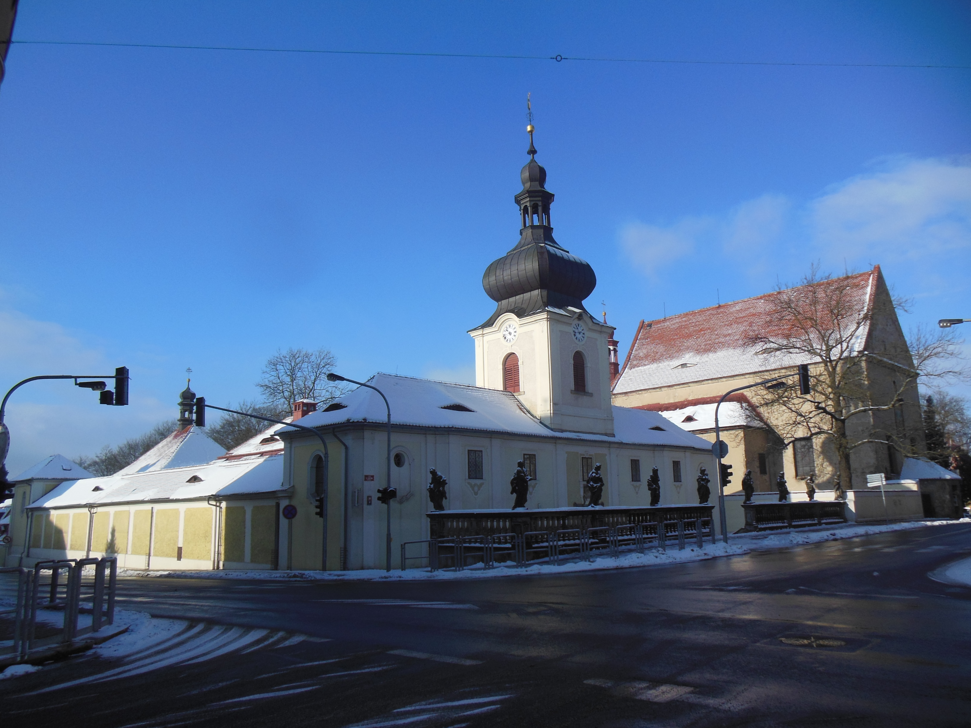 Rumburk (okres Děčín). Ulice třída 9. května, klášter kapucínů.